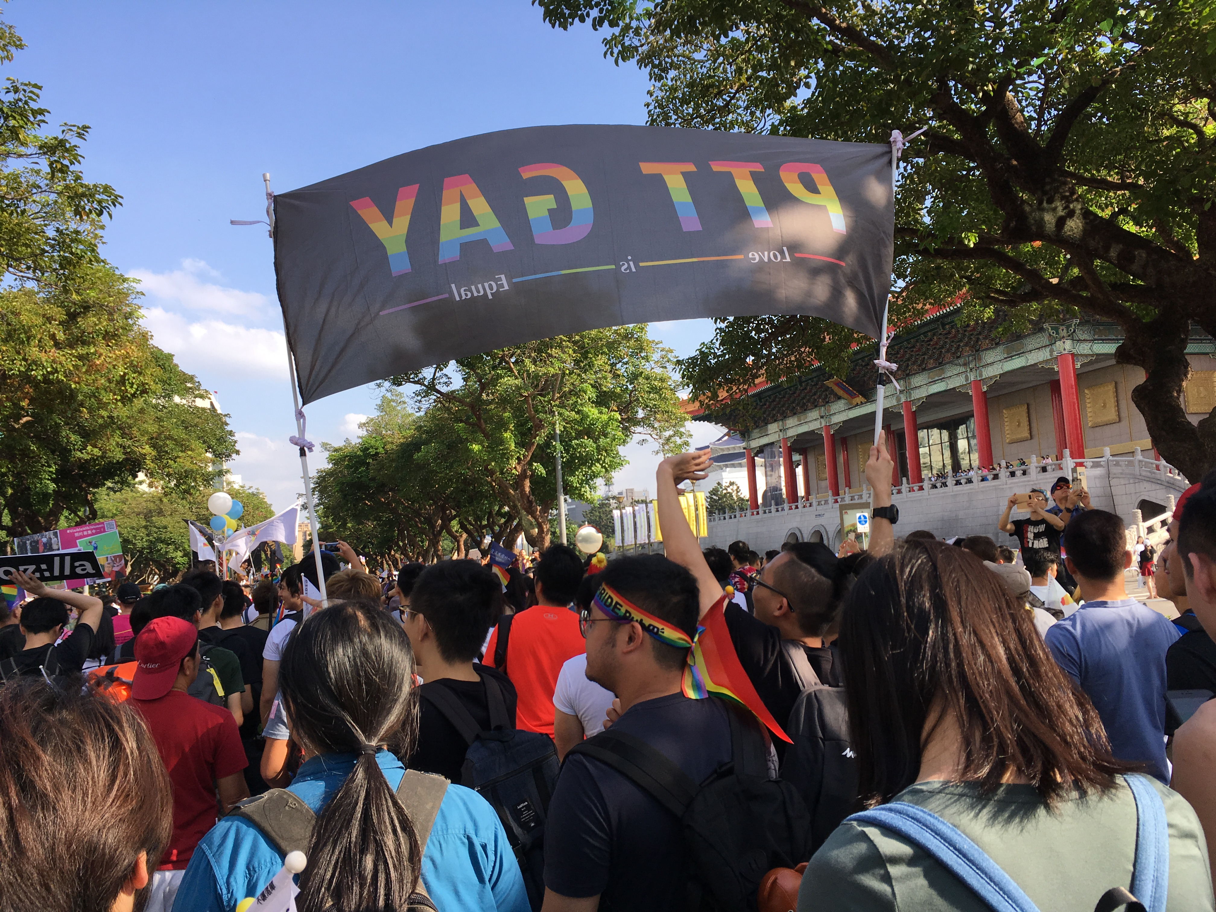 2018台灣同志遊行，PTT GAY版社群